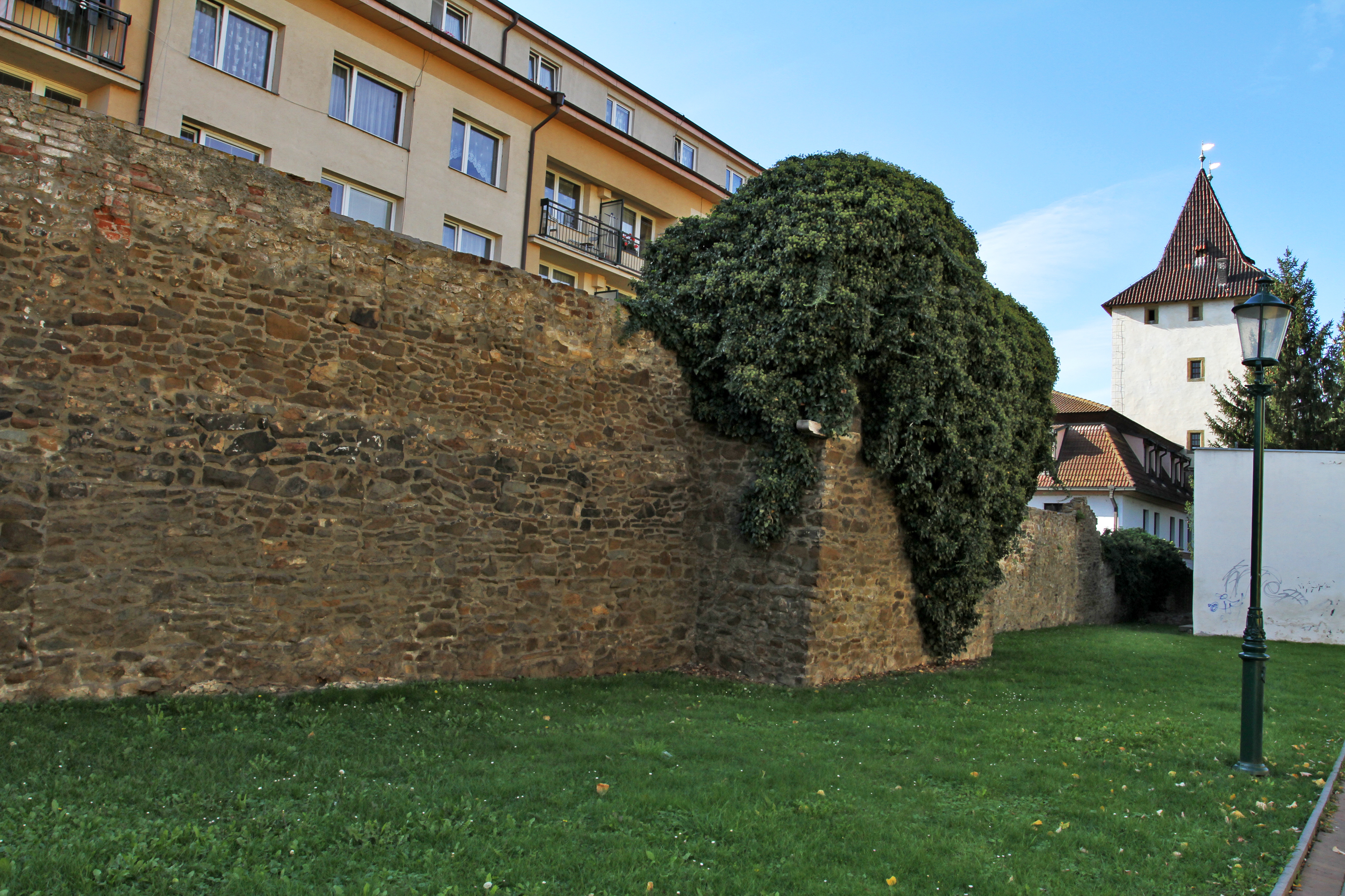 Městské opevnění (Beroun), Beroun